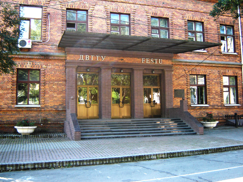 Главный вход в Дальневосточный Государственный технический универсистет, Владивосток, Пушкинская 10